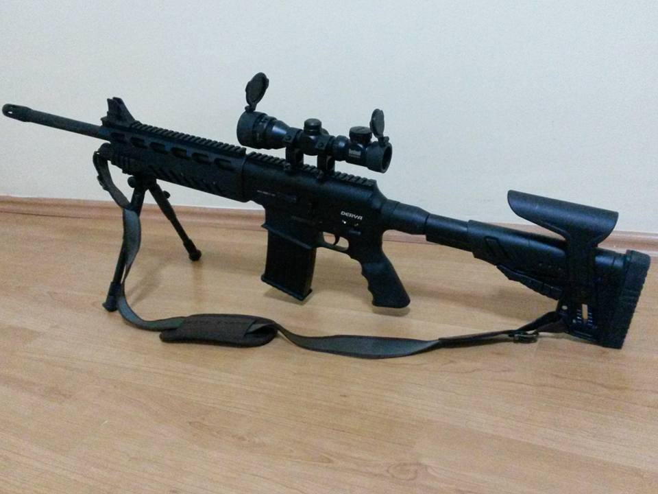 Picatinny ile bipod ve dürbün takılmış bir MK-10